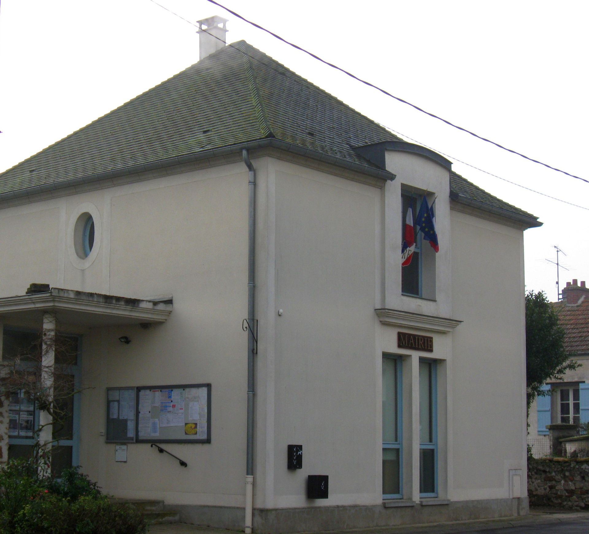 Ancienne mairie de Barcy. (département de la Seine-et-Marne, région Île-de-France), devenue école depuis 2017.